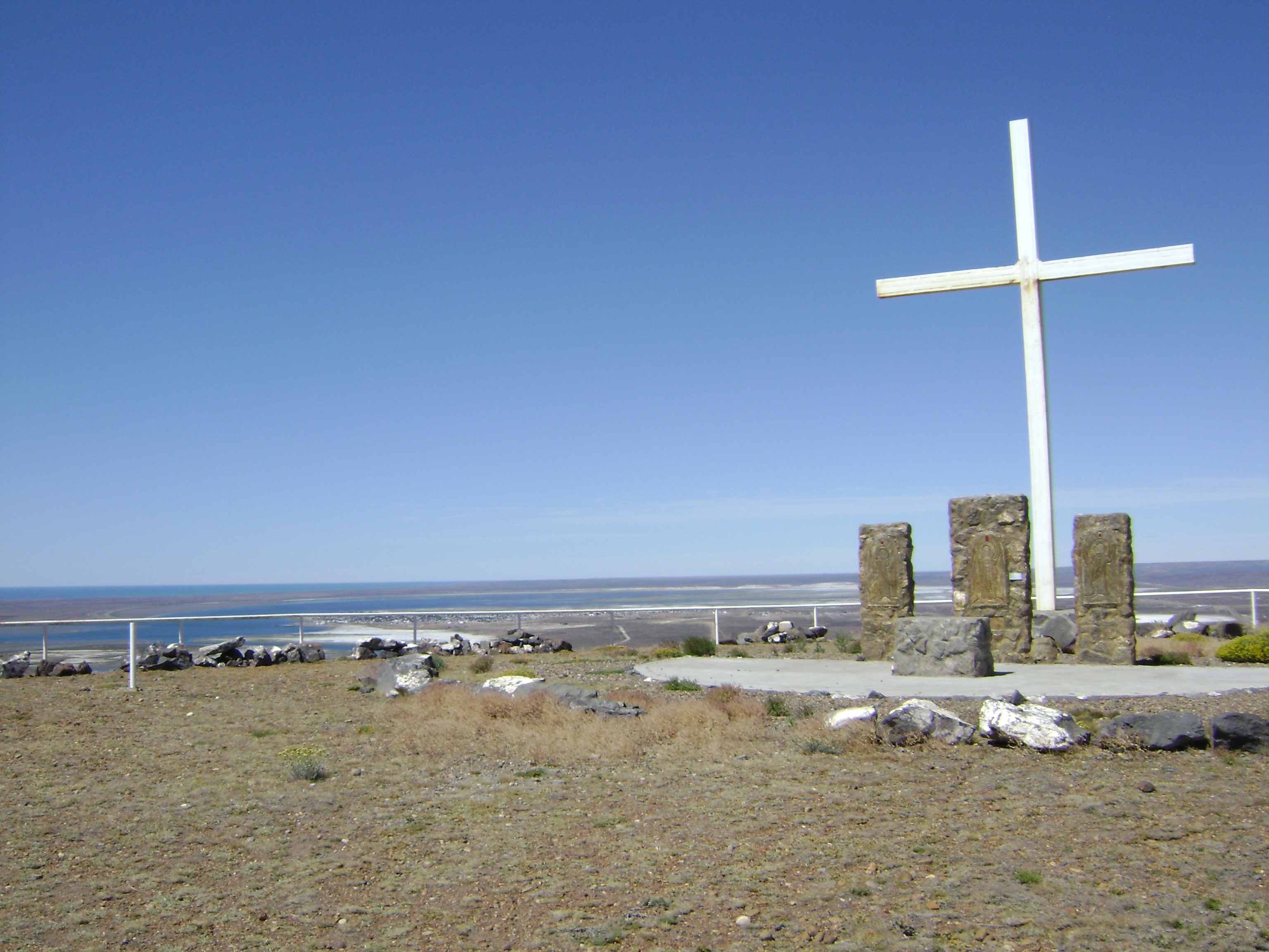 Cerro de Monte Cristo. En este cerro es donde Magallanes manda a instalar una gran cruz antes de su partida el 21.08.1520. Antonio Pigafetta, cronista (nao Trinidad), escribió en su Relación del primer viaje alrededor del mundo: "Toma de posesión.- Plantamos una cruz en la cima de una montaña cercana, a la que llamamos Monte-Cristo, y tomamos posesión de esta tierra en nombre del rey de España." José de Arteche escribe en su libro El Cano: "Costeando siempre, al llegar a los 49° 30' de latitud meridional las naos hallaron un excelente abrigo, un buen puerto natural, que al punto fue denominado por todos el puerto de San Julián, en recuerdo del día de su descubrimiento. Aquellos hombres estaban muy compenetrados con el año cristiano. Magallanes considerando que aquella rada era muy cómoda ordenó detenerse. Las naos allí pasarían el terrible invierno austral. Inmediatamente después del desembarco, unos hombres marcharon a la cima del monte que domina el puerto y clavaron allí una gran Cruz. Con este acto sencillo y grandioso tomaron posesión de aquellas tierras". La expedición de Magallanes-Elcano estuvo en esta región patagónica desde el 31.03.1520 hasta su partida, el 21.08.1520. Posteriormente, en 1670, la expedición del contralmirante británico John Narborough exploró las costas patagónicas y John Wood, uno de sus hombres, acompañado de otros marinos, inspeccionó la bahía de San Julián, ascendió al "Monte de Cristo" y practicó en la tosca del lugar la inscripción "John Wood". En 1746 la expedición de Joaquín Olivares y Centeno descubrió la inscripción y desde entonces el monte es conocido como Monte Wood. Puerto de San Julián. Santa Cruz. Argentina. Vídeo: Expedición Elcano - Magallanes